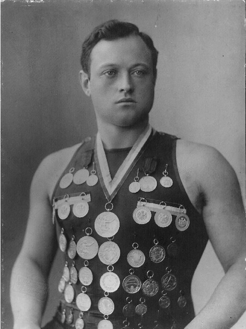 Piet Ooms met medailles